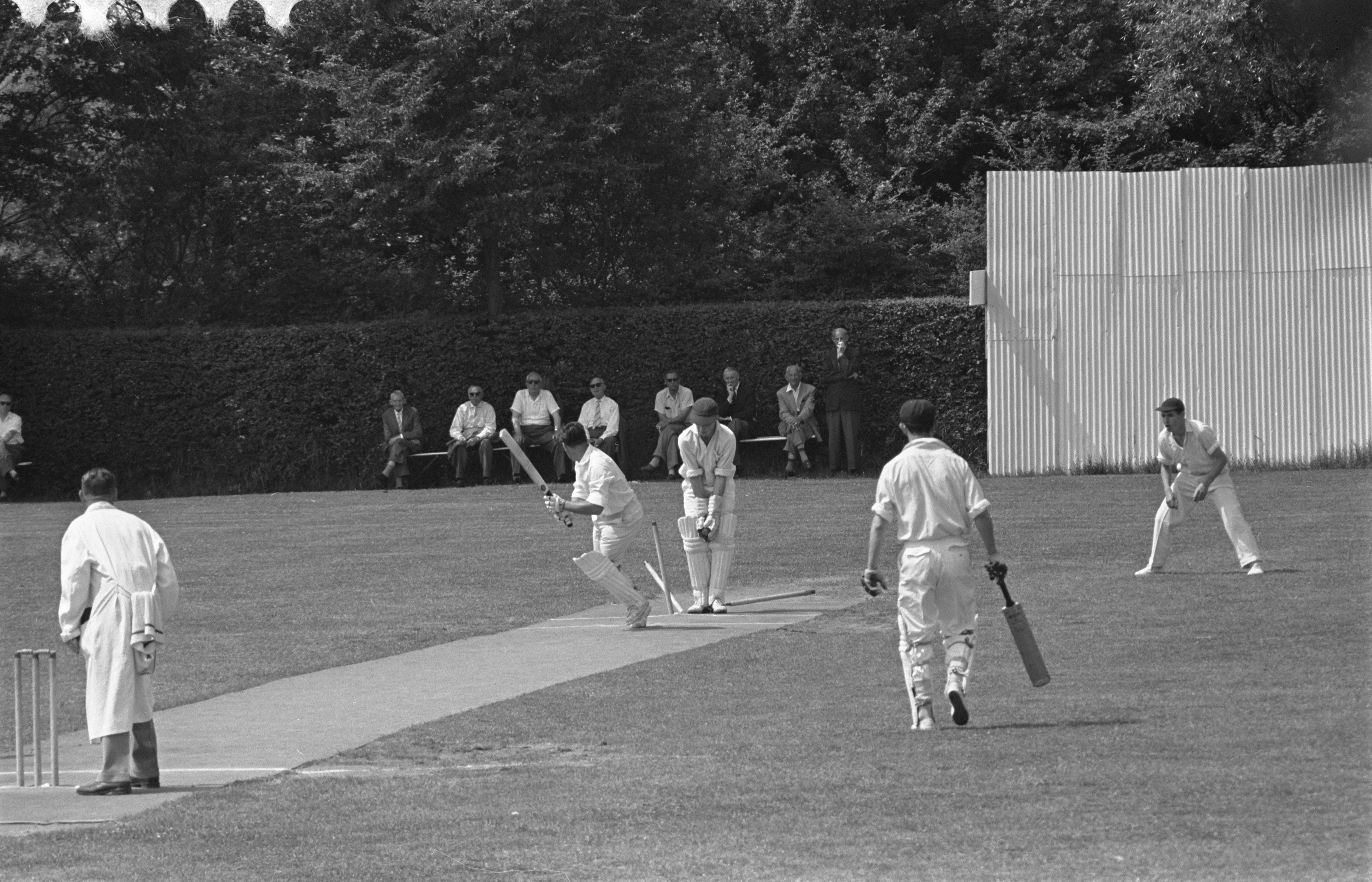 Collectie / Archief : Fotocollectie Anefo Reportage / Serie : [ onbekend ] Beschrijving : Cricket ACC tegen Rood en Wit Datum : 19 juli 1959 Fotograaf : Pot, Harry / Anefo Auteursrechthebbende : Nationaal Archief Materiaalsoort : Negatief (zwart/wit) Nummer archiefinventaris : bekijk toegang 2.24.01.05 Bestanddeelnummer : 910-5367